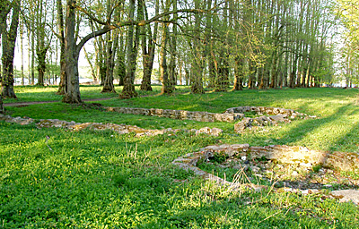 Fussingø ruin af borg fra omkring 1555, nedrevet i omkring 1790. Beliggende i Ålum Sogn , Purhus Kommune (Sønderlyng Herred, Viborg Amt, Denmark).